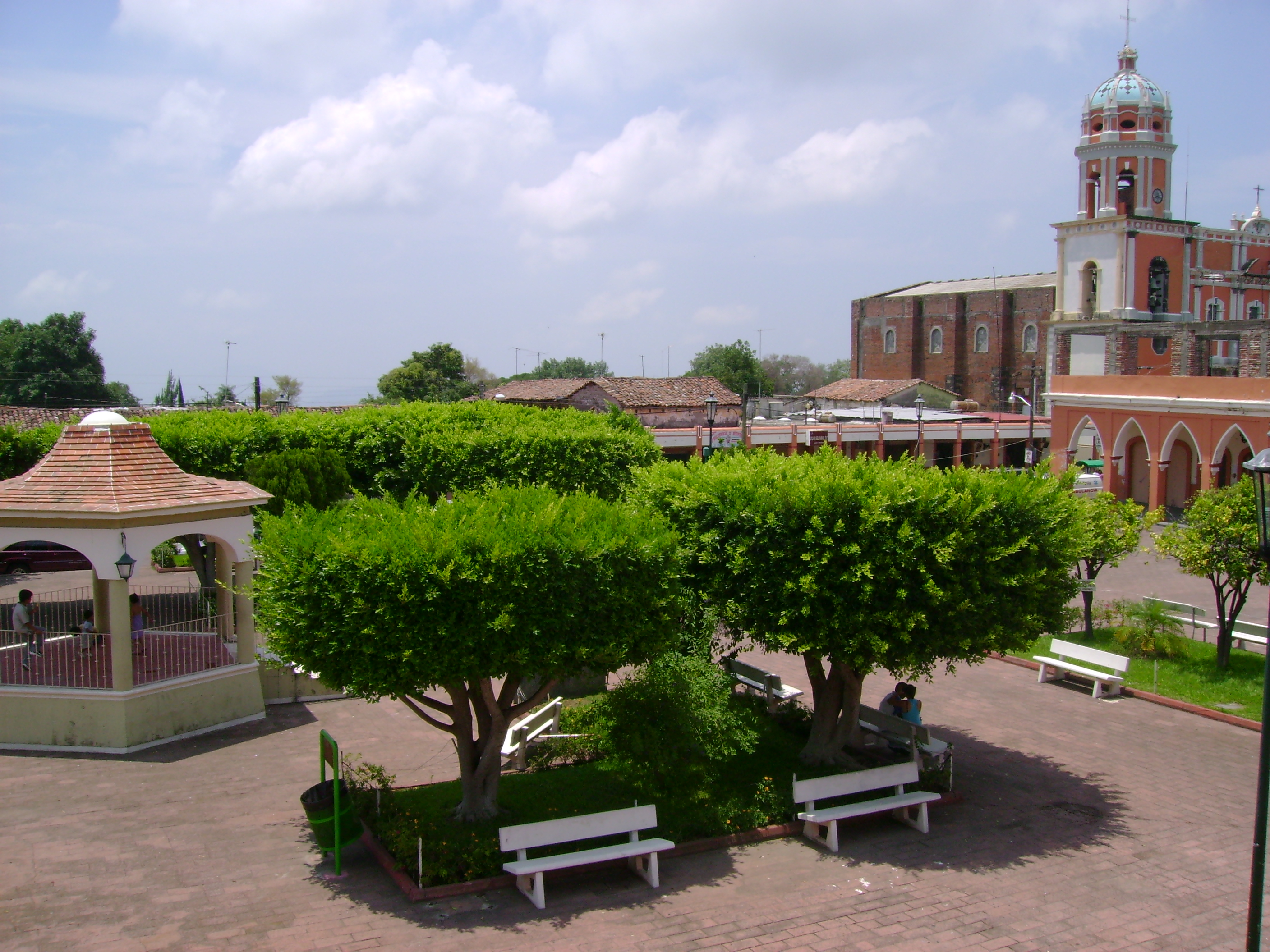 Centro de Tonila